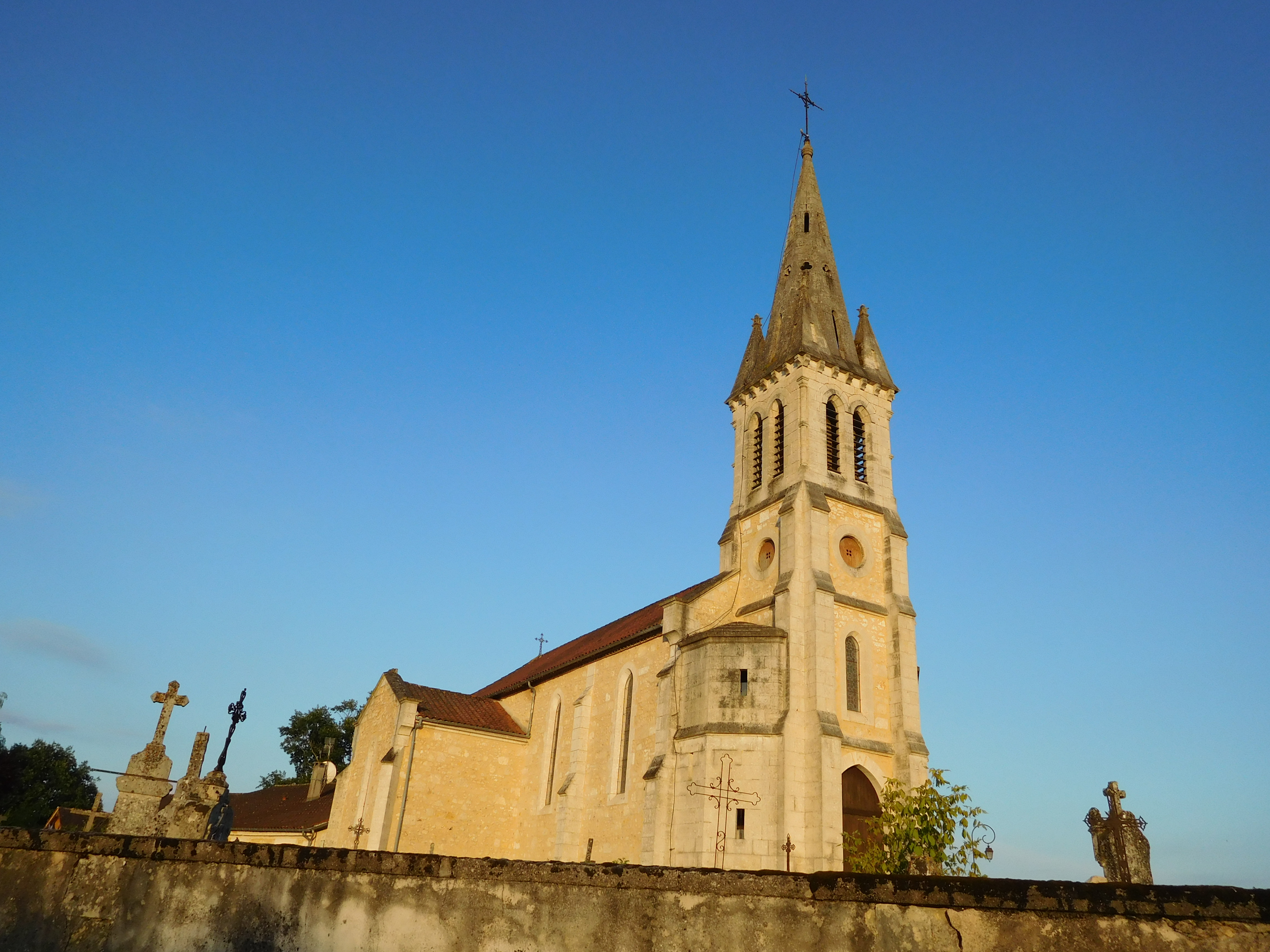 L'église Saint-Jacques de Bosset (Dordogne, France).